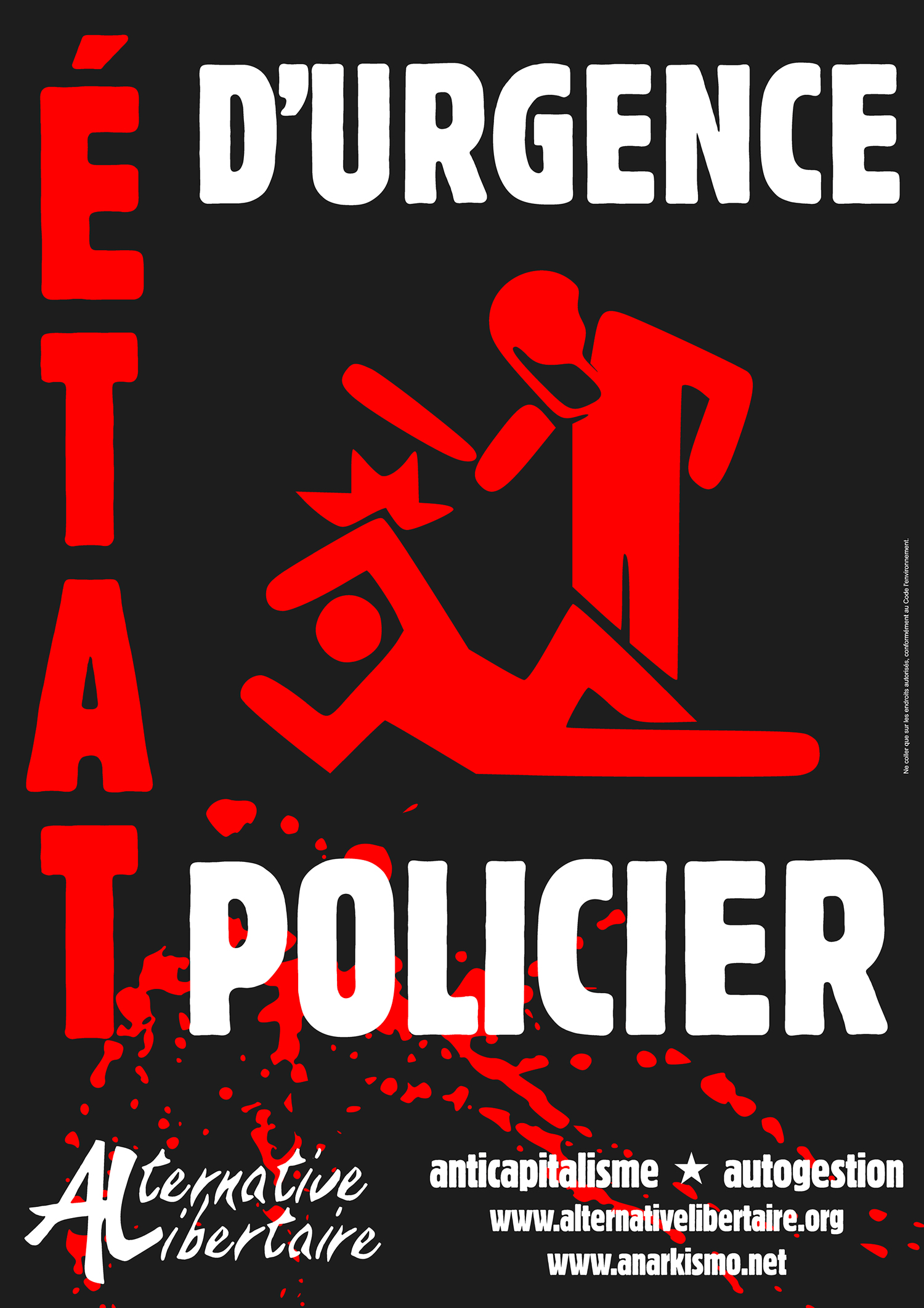 septembre 2017 Affiche d'Alternative libertaire (AL), organisation communiste libertaire française.